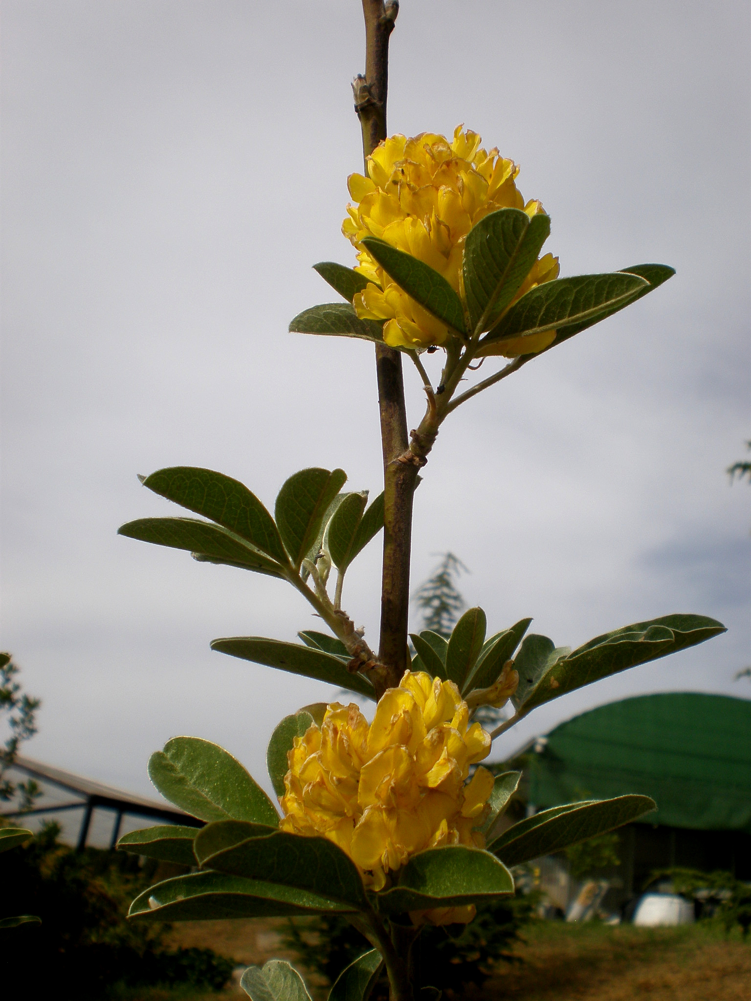 Jardín Botánico de Barcelona.